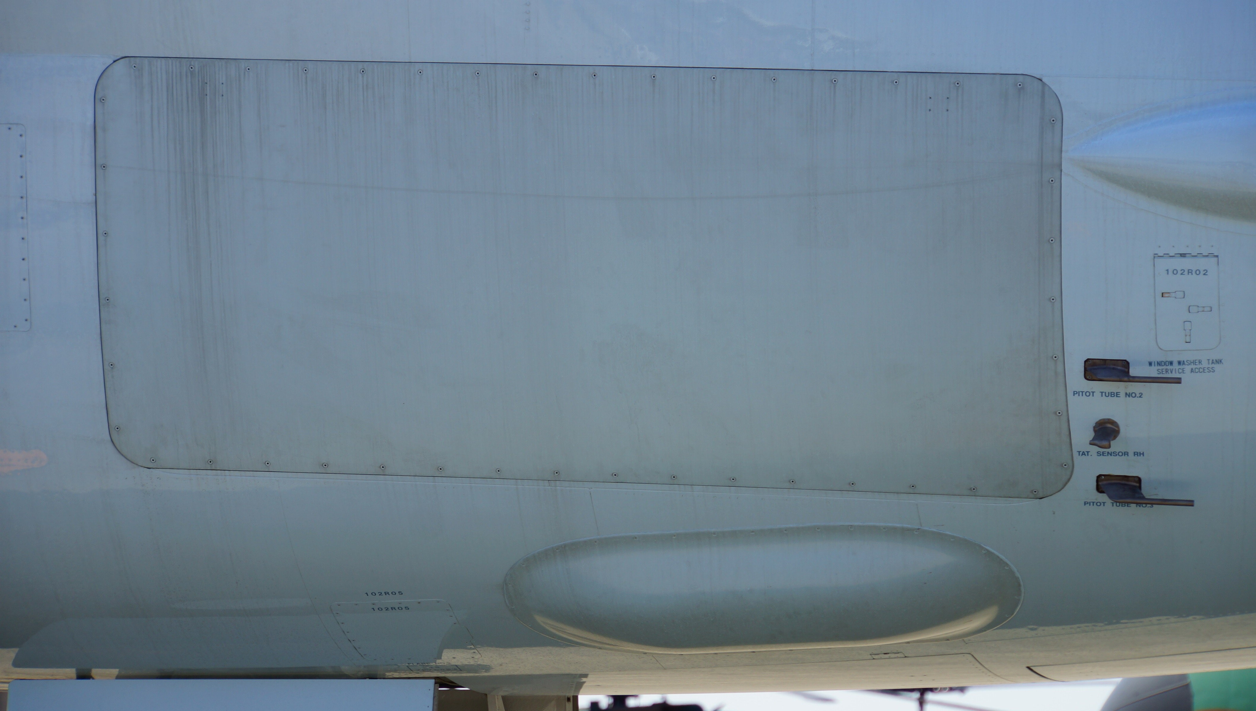 海上自衛隊 P-1哨戒機（5503号機） 機首右下HPS-106アクティブ・フェーズド・アレイ・レーダー収納部分。 14年9月28日 航空自衛隊浜松基地にて。